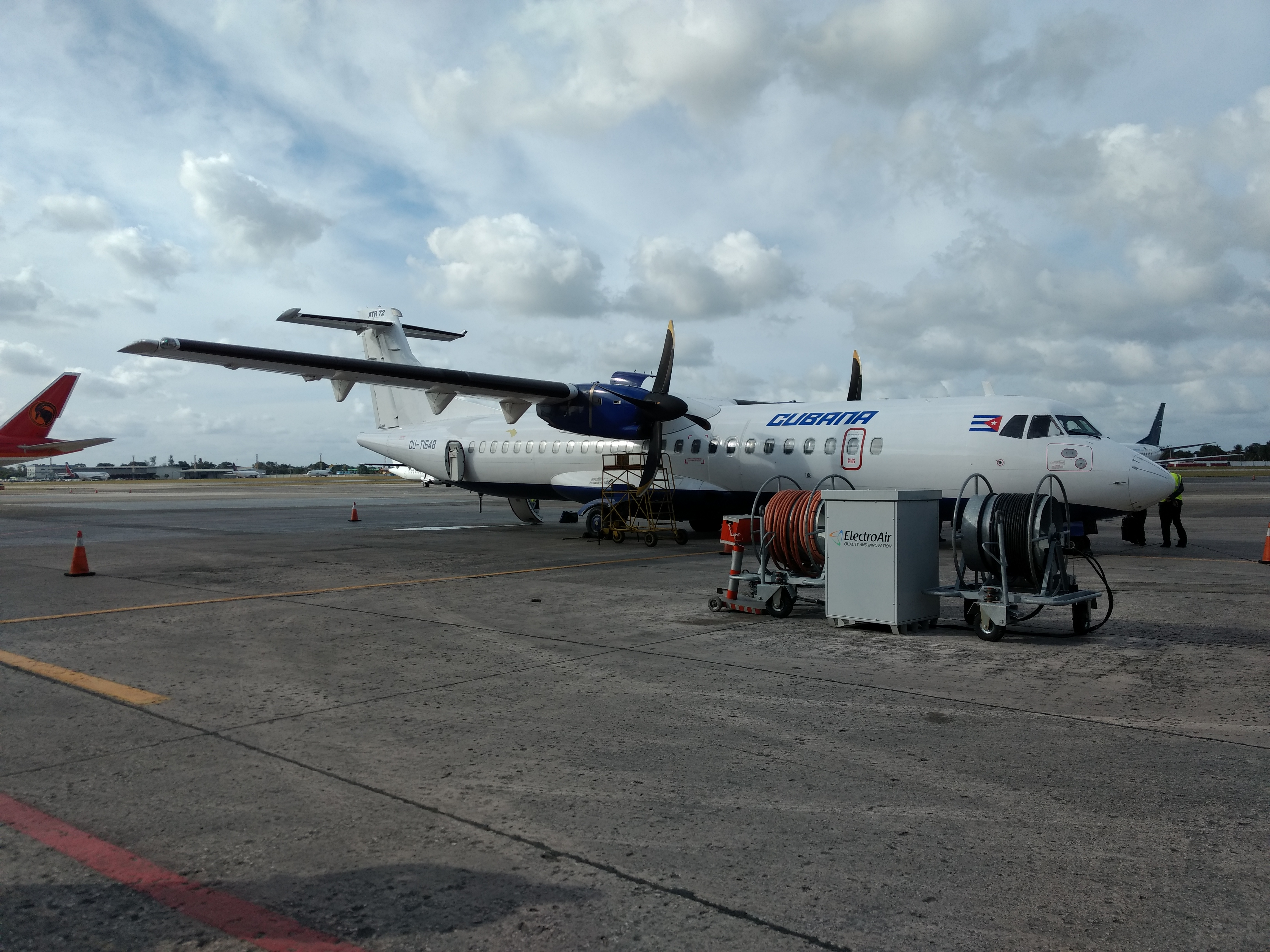 ATR de Cubana con su nuevo esquema de colores (2018).